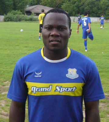 Kengne Ludovick